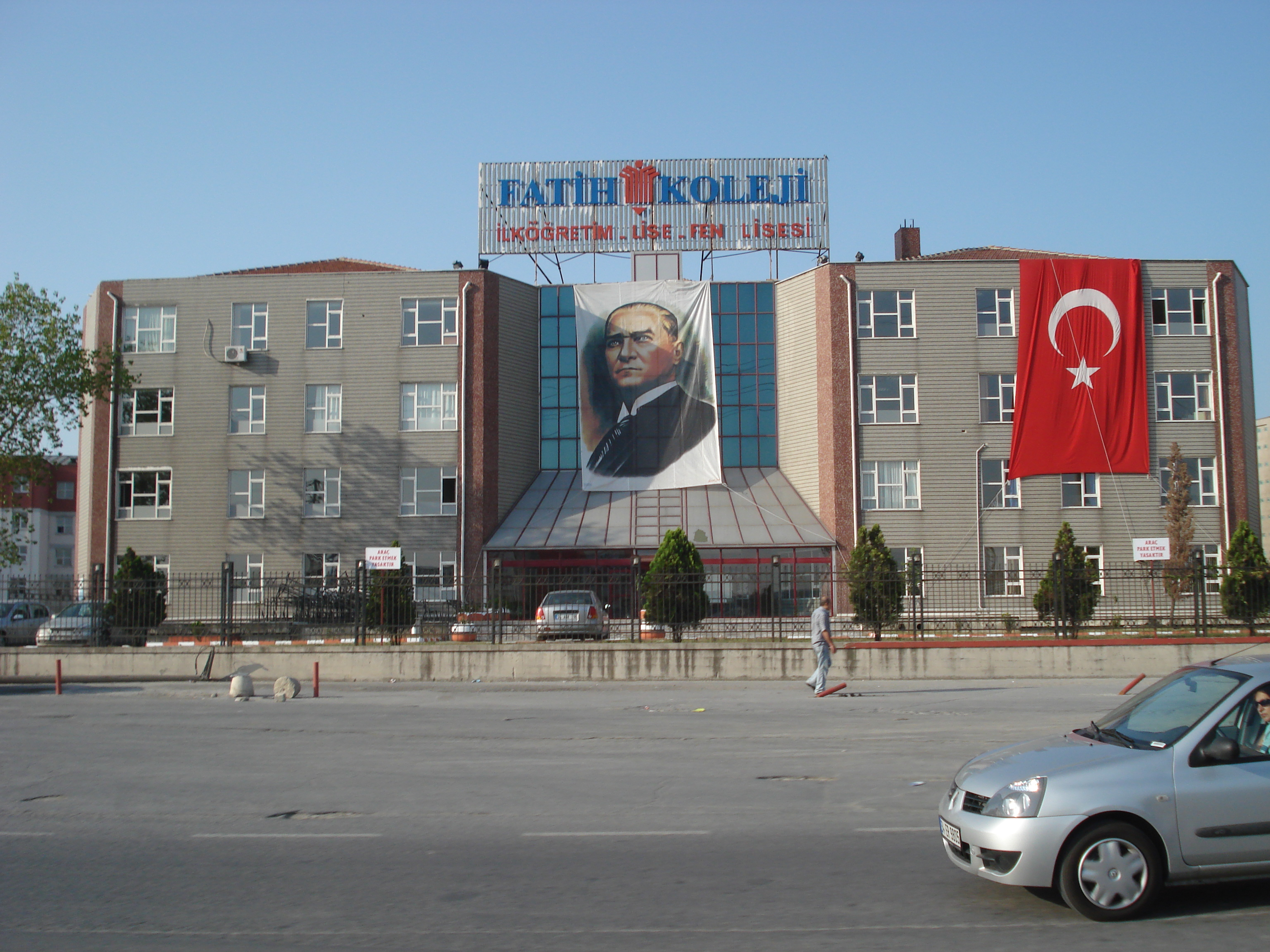 The Fatih College in Büyükçekmece in İstanbul